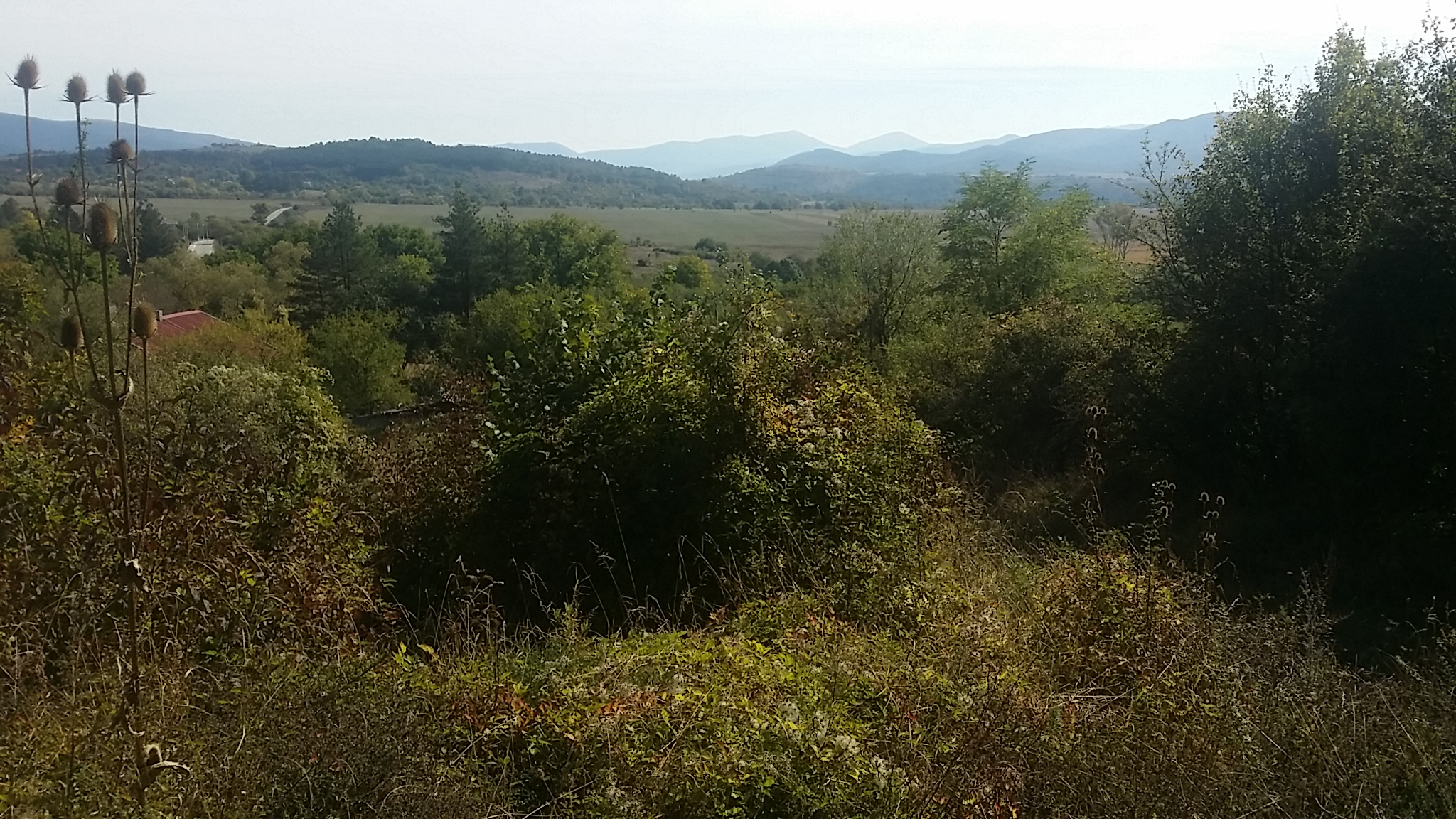 Изглед към Знеполе от с. Ранилуг